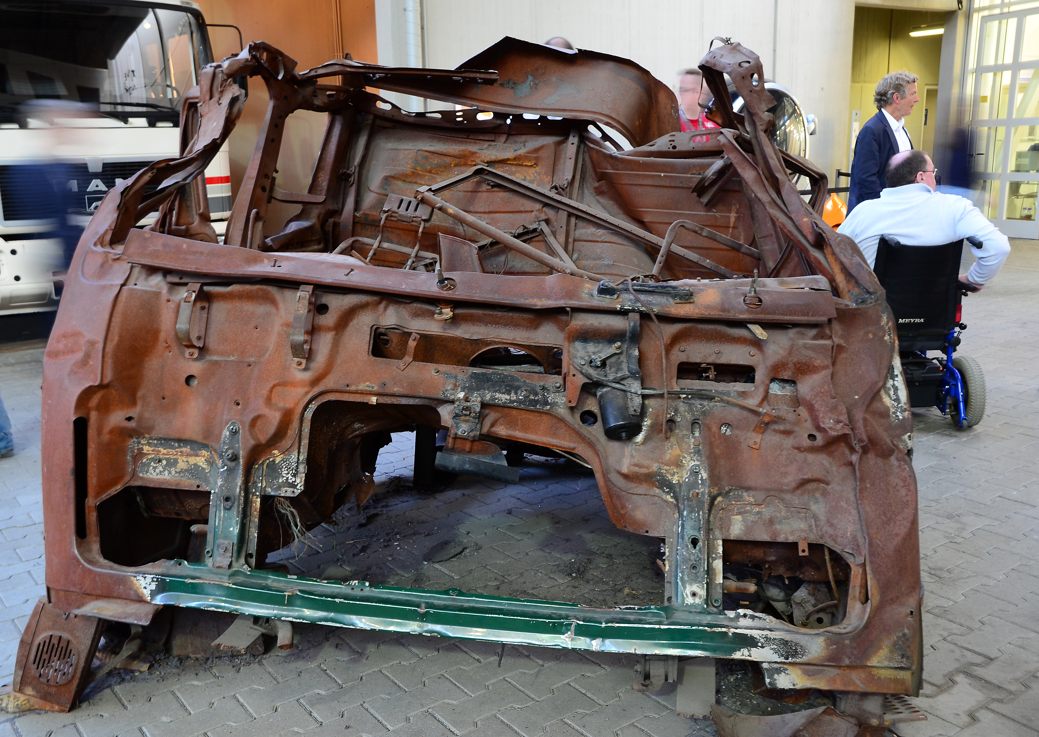 Dortmund, DASA, Reste der Zugmaschine des in Herborn verunfallten LKW von vorne